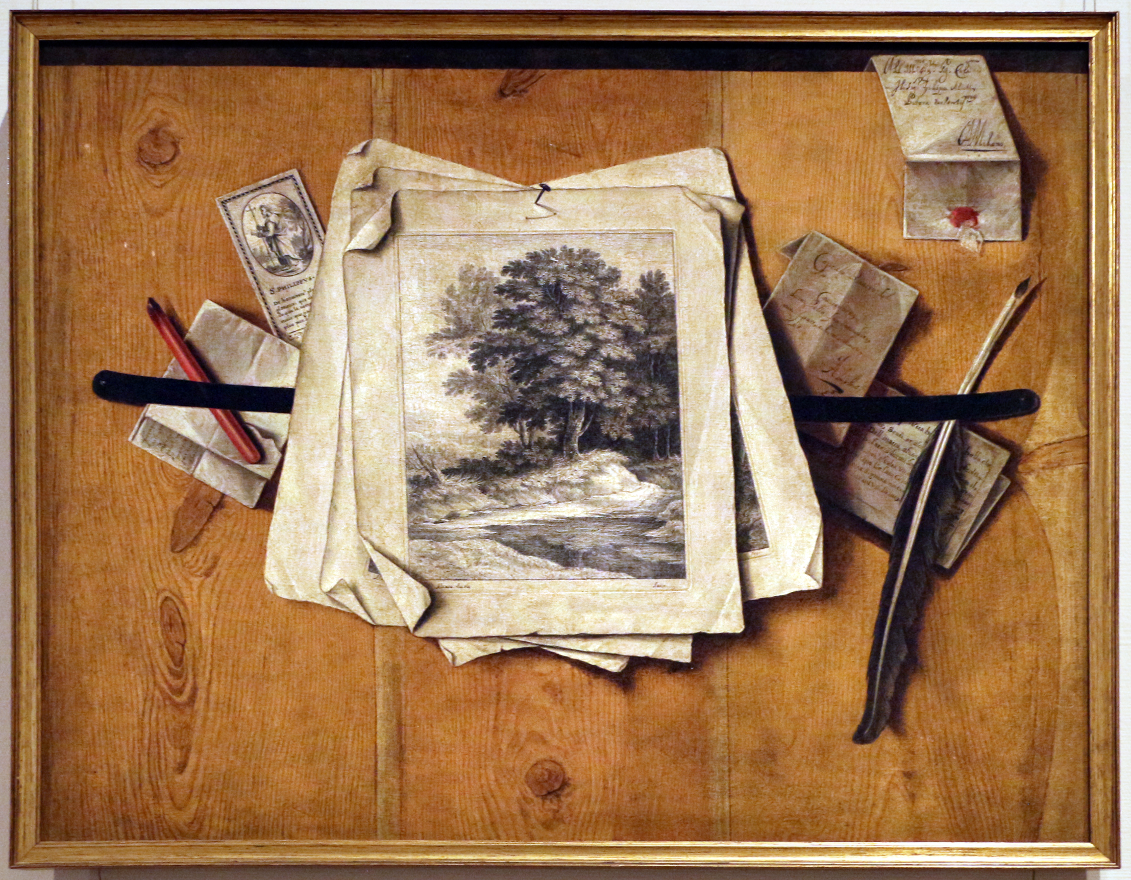 trompe-l'oeil con stampetitle QS:P1476,it:"trompe-l'oeil con stampe" label QS:Lit,"trompe-l'oeil con stampe"